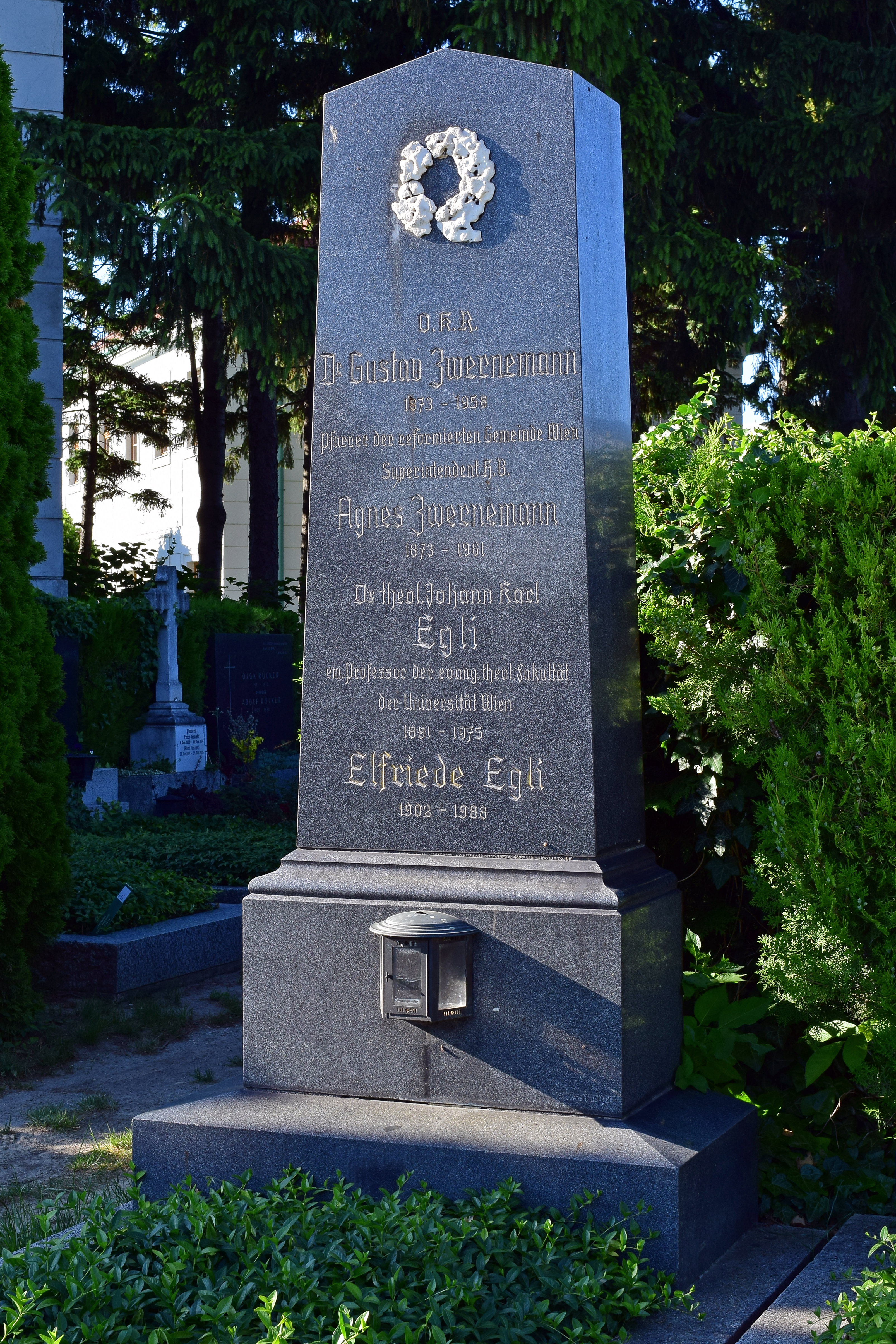 Ehrenhalber gewidmetes Grab von Johann Karl Egli und Gustav Zwernemann auf dem evangelischen Friedhof im Wiener Zentralfriedhof, Pfarrgräber, Nr. 20